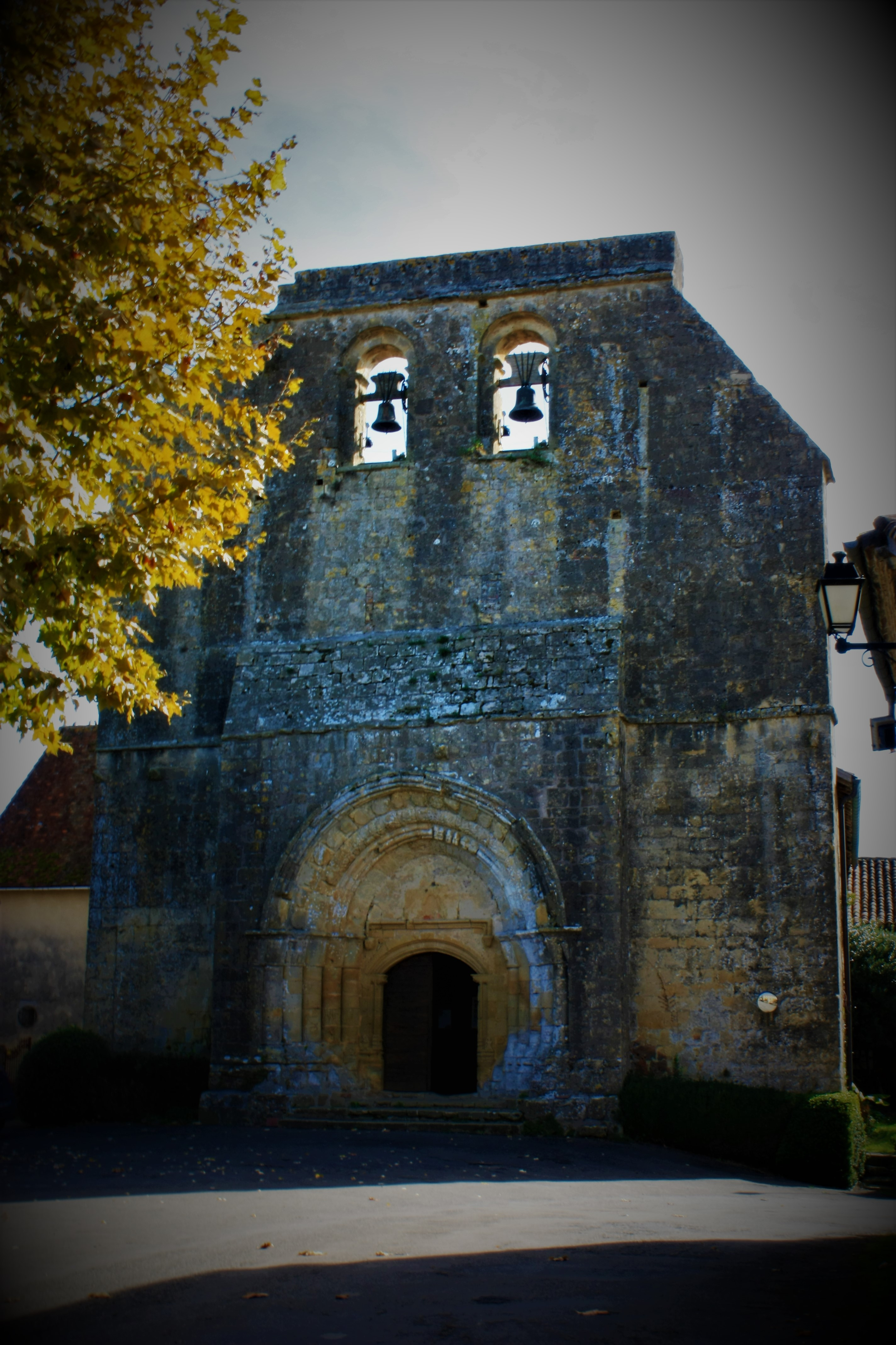 Eglise de Pimbo - façade